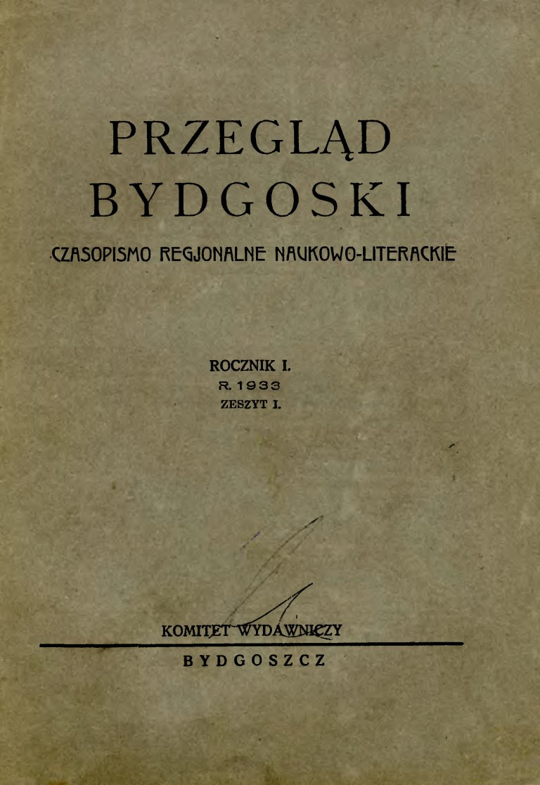 Strona tytułowa pierwszego numeru czasopisma regionalnego "Przegląd Bydgoski", 1933 rok.